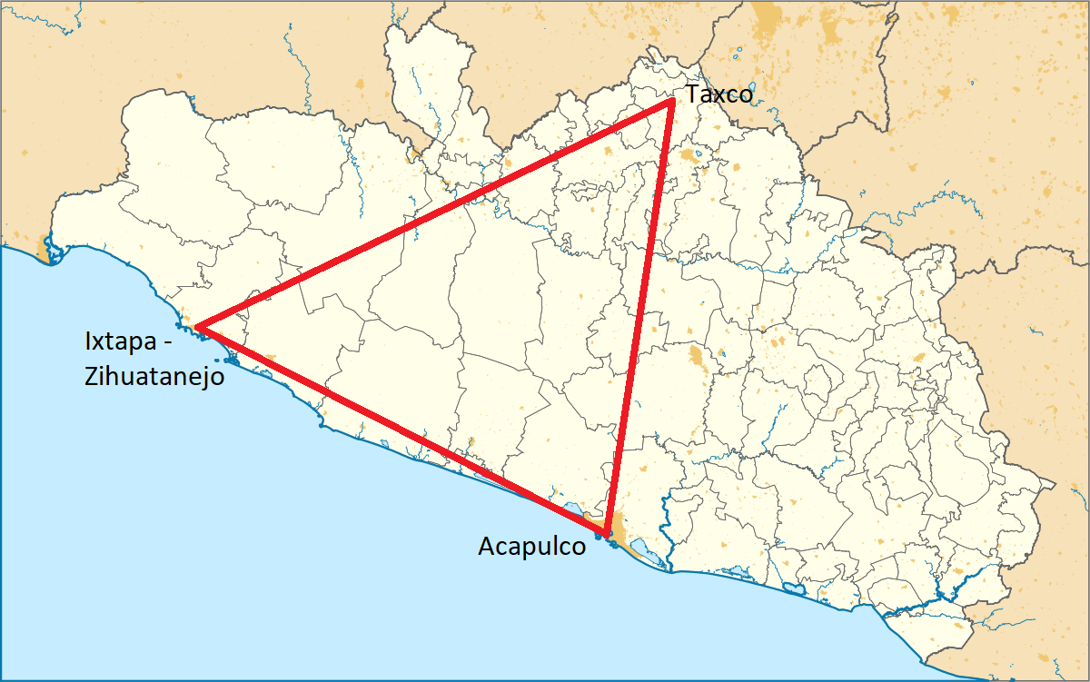 Mpa de Localizacion del Triangulo del Sol en Guerrero